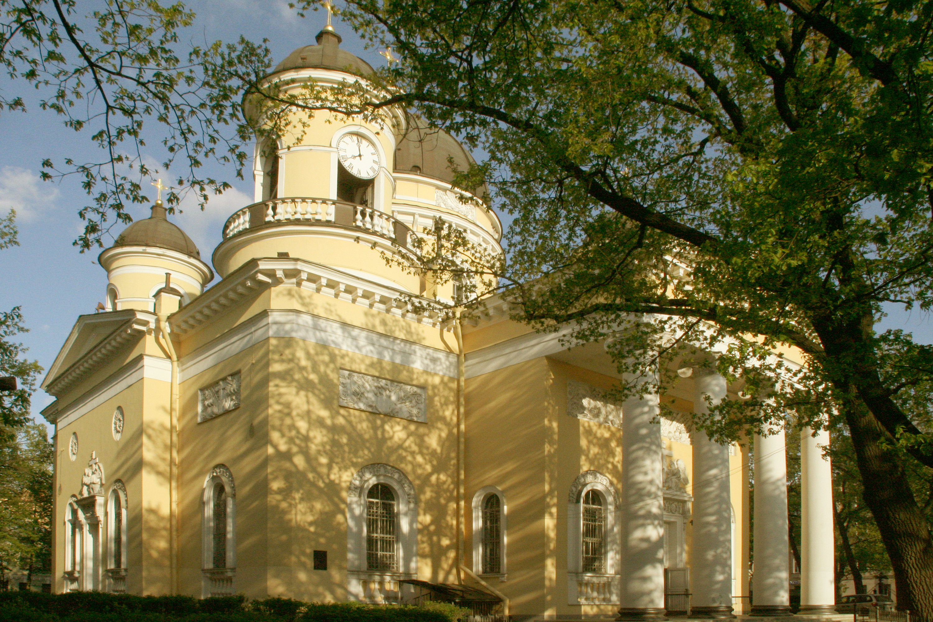 Cathédrale de la Transfiguration